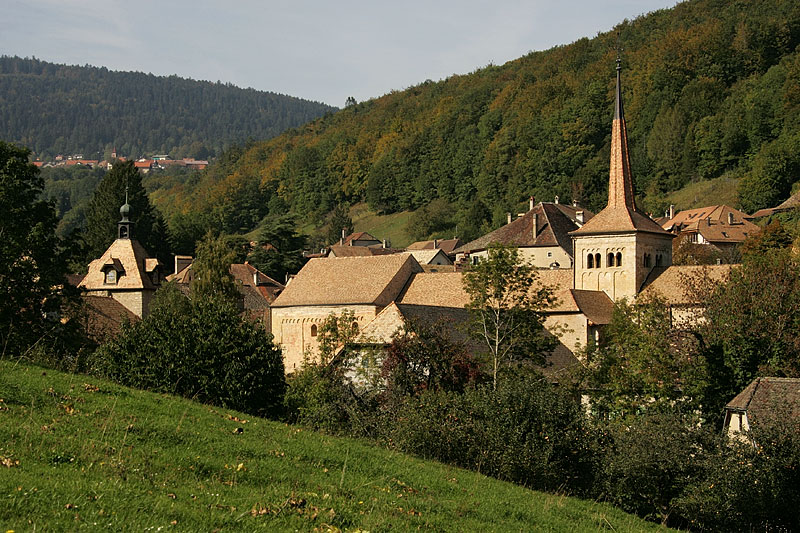 Kirche von Romainmôtier